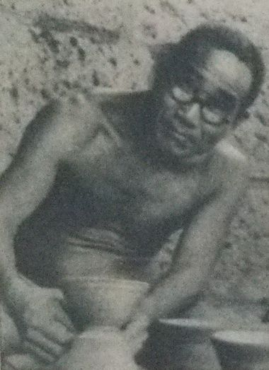 上口愚朗（陶芸家）